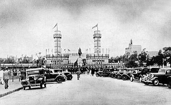 Inauguração da Exposição do Centenário Farroupilha